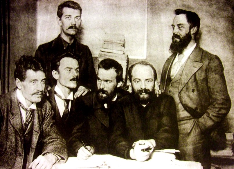 Польские социалисты в Лондоне. Слева направо: И. Мосьцицкий, А. Енджеевский, С. Миклашевский, Ю. Пилсудский, А. Дембский, В. Йодко-Наркевич.